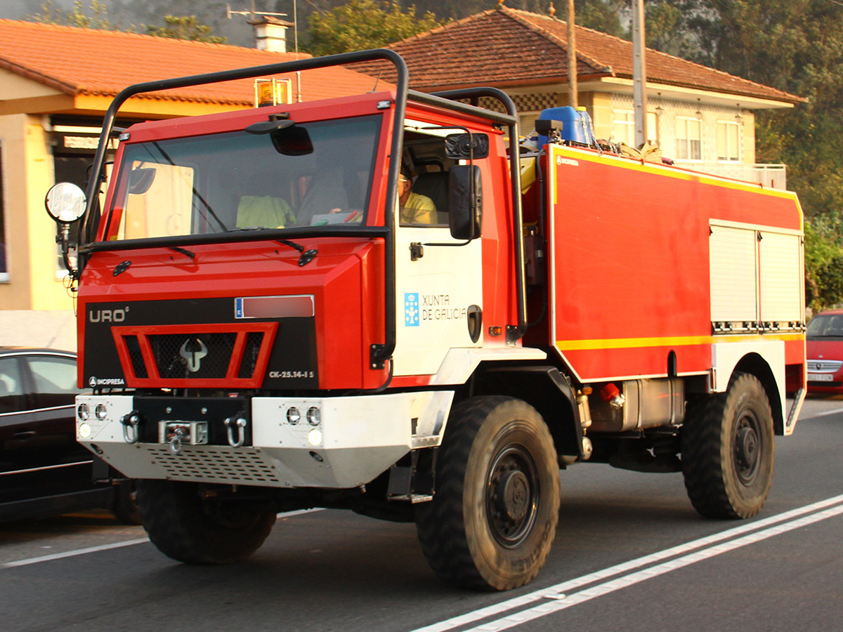 Ola de terrorismo incendiario en Galicia Wave of incendiary terrorism in Galicia